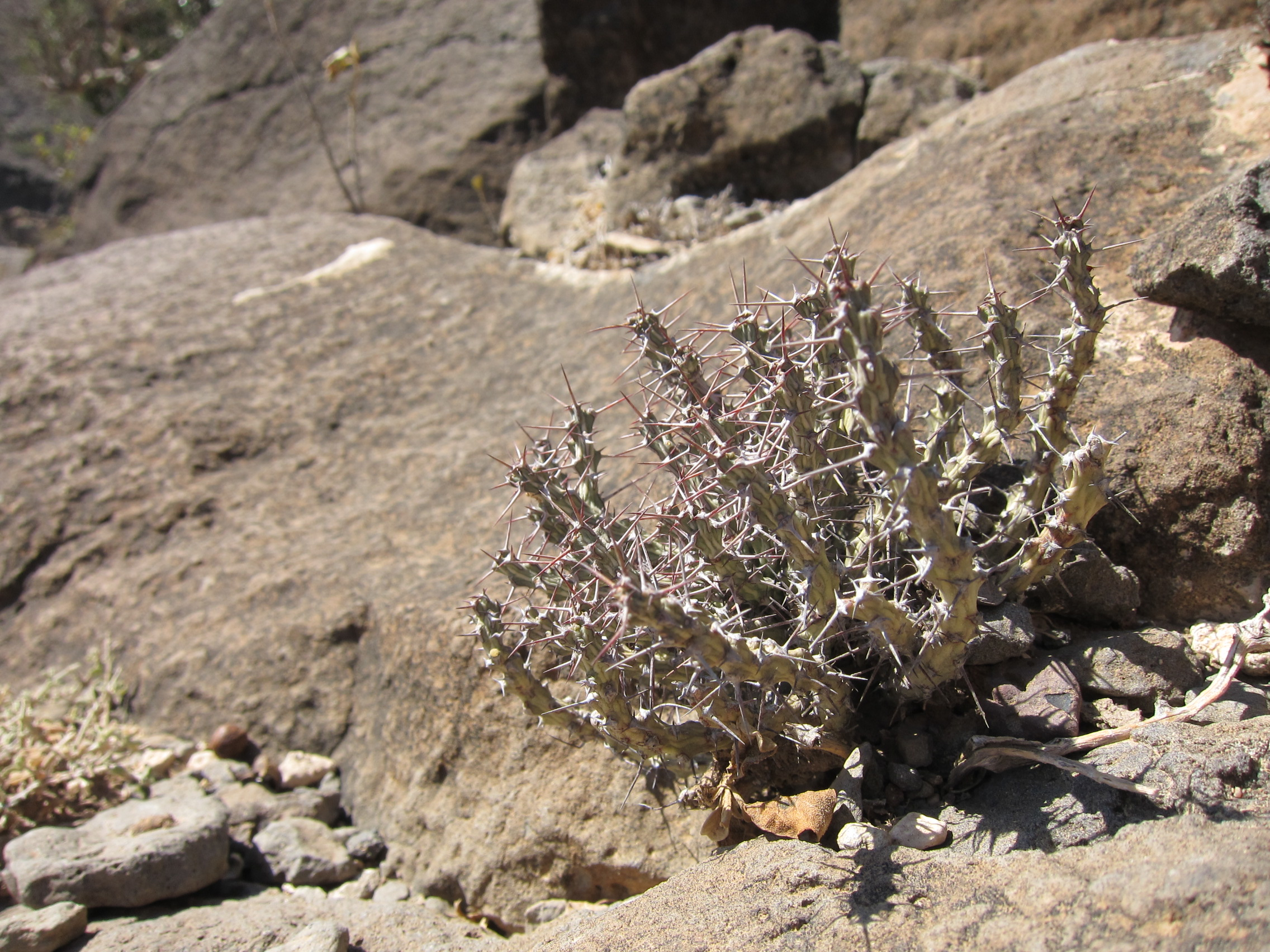 Euphorbia godana Buddens., Lawant & Lavranos, Monts Goda, Djibouti